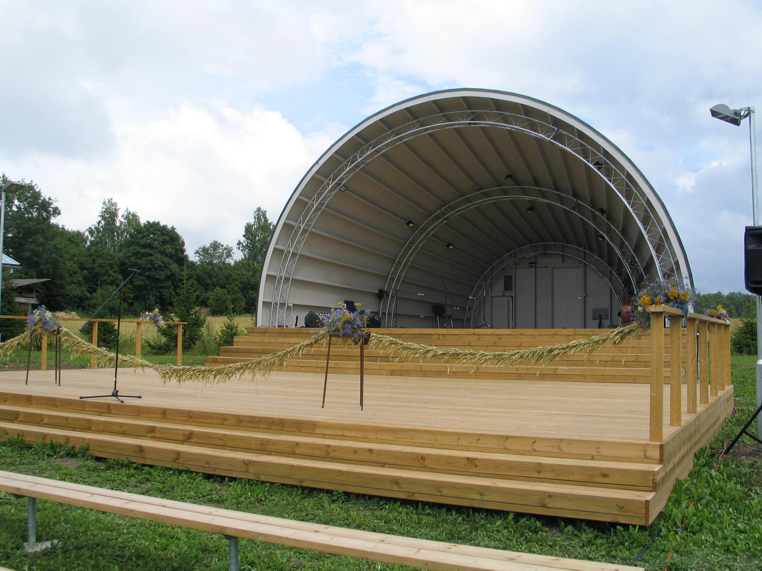 Jööri laululava vahetult enne ametlikku avamist